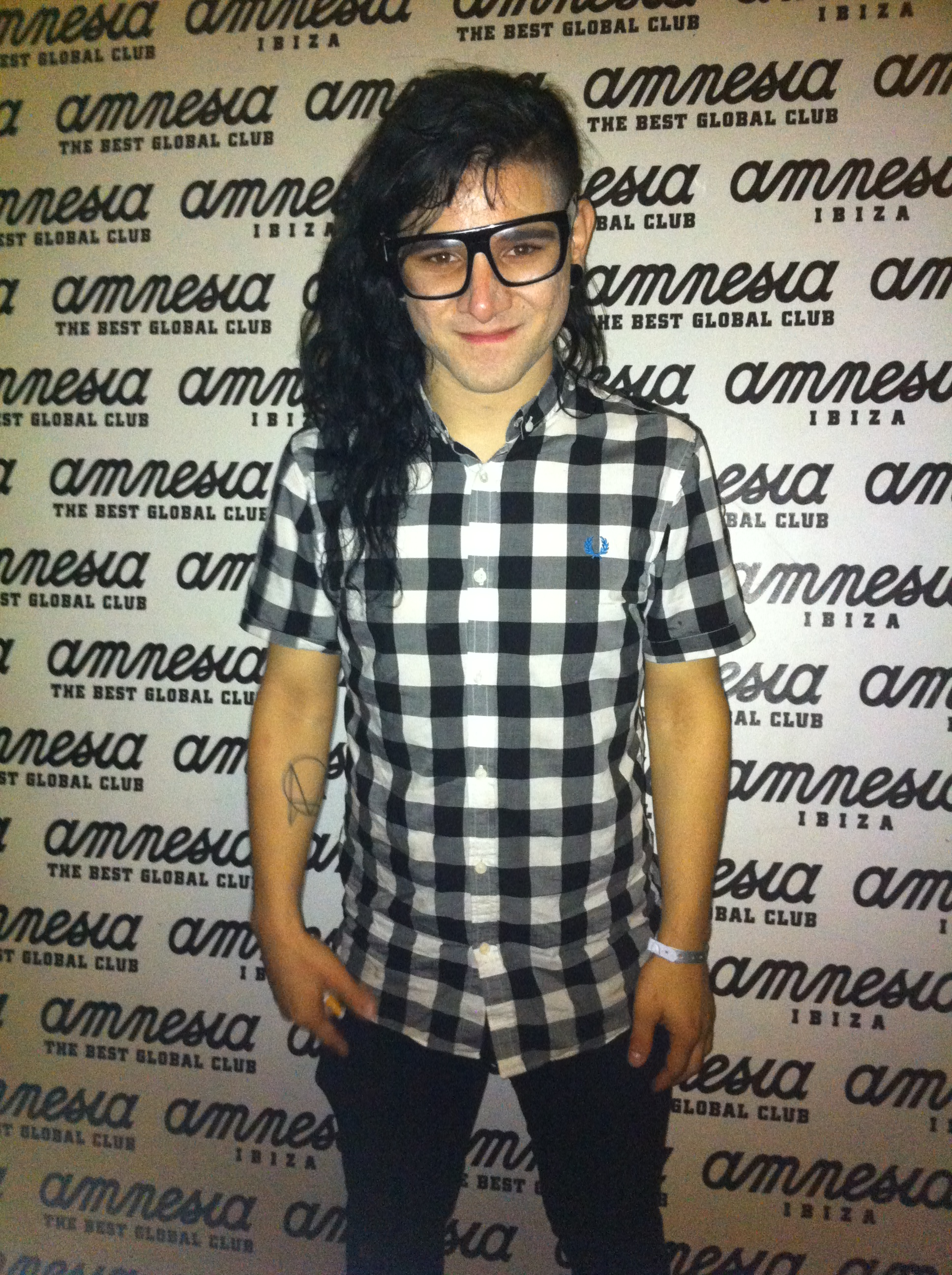 03.07.12 - Skrillex at Amnesia